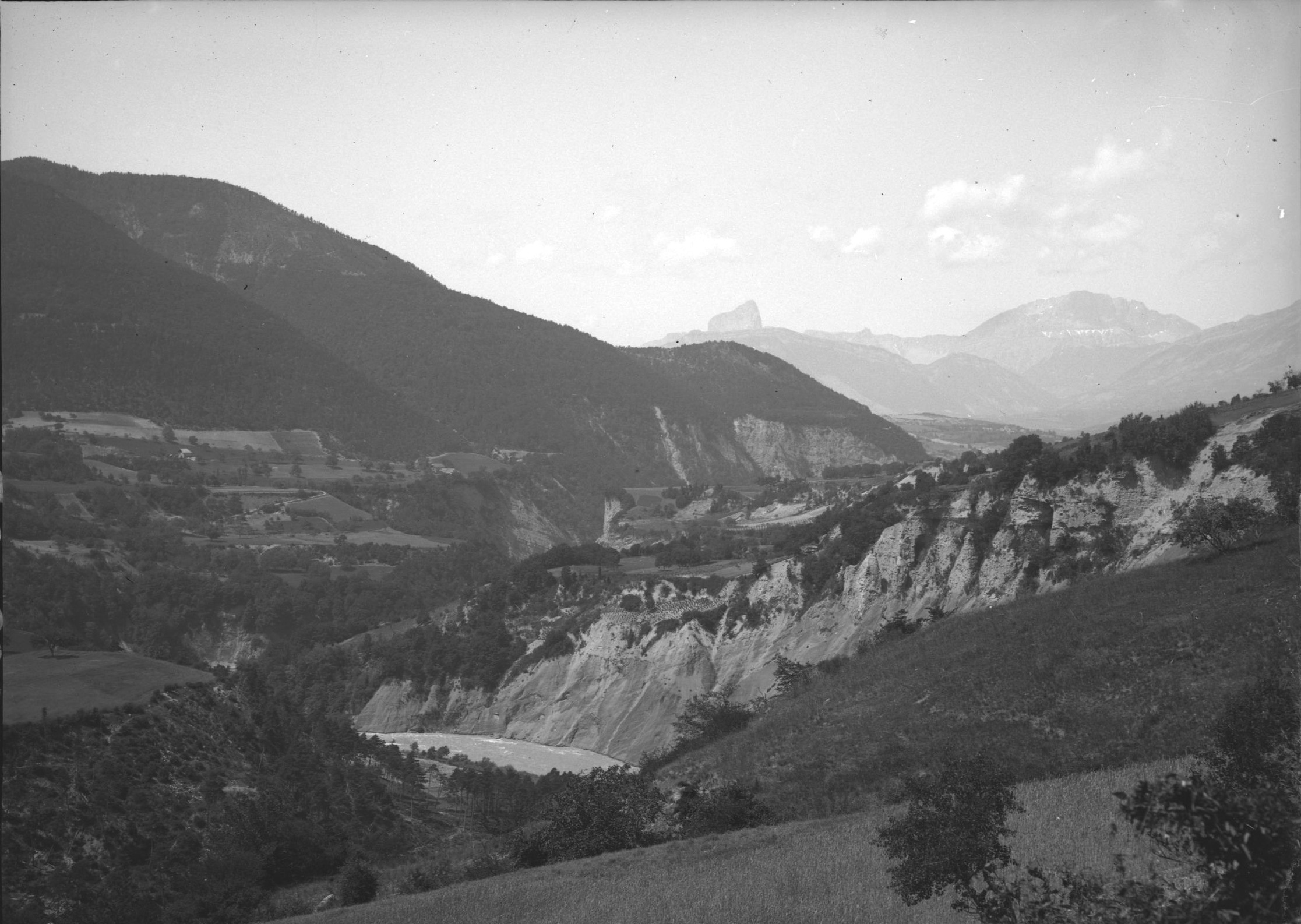 Niveaux du Drac à Mayers en 1911. Mayres-Savel, Isère, France. Image numérique réalisée par le Département de l'Isère à partir de la plaque de verre NB négatif par Blanchard Raoul. La plaque d'origine est conservée au Musée Dauphinois de Grenoble.